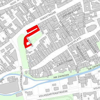 Karte Schloss Polheim - Lage im stadtgebiet, Karte wurde mir vom Stadtarchiv Wels zur Verfügung gestellt